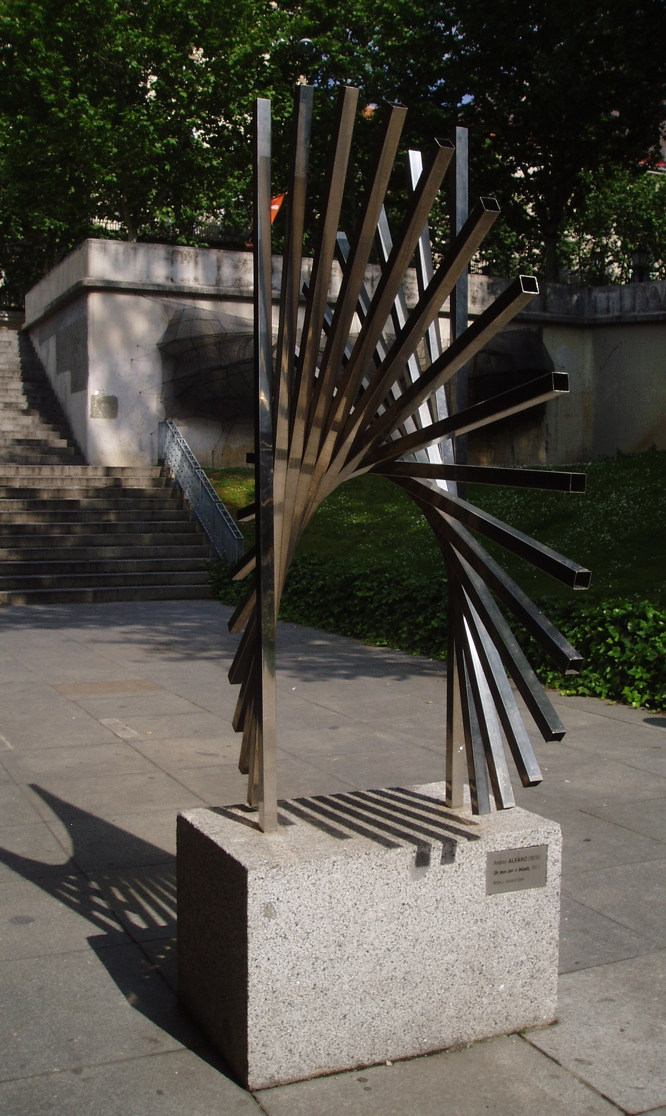 Un món per a infants. Andreu Alfaro. Museo Arte Público. Madrid. España